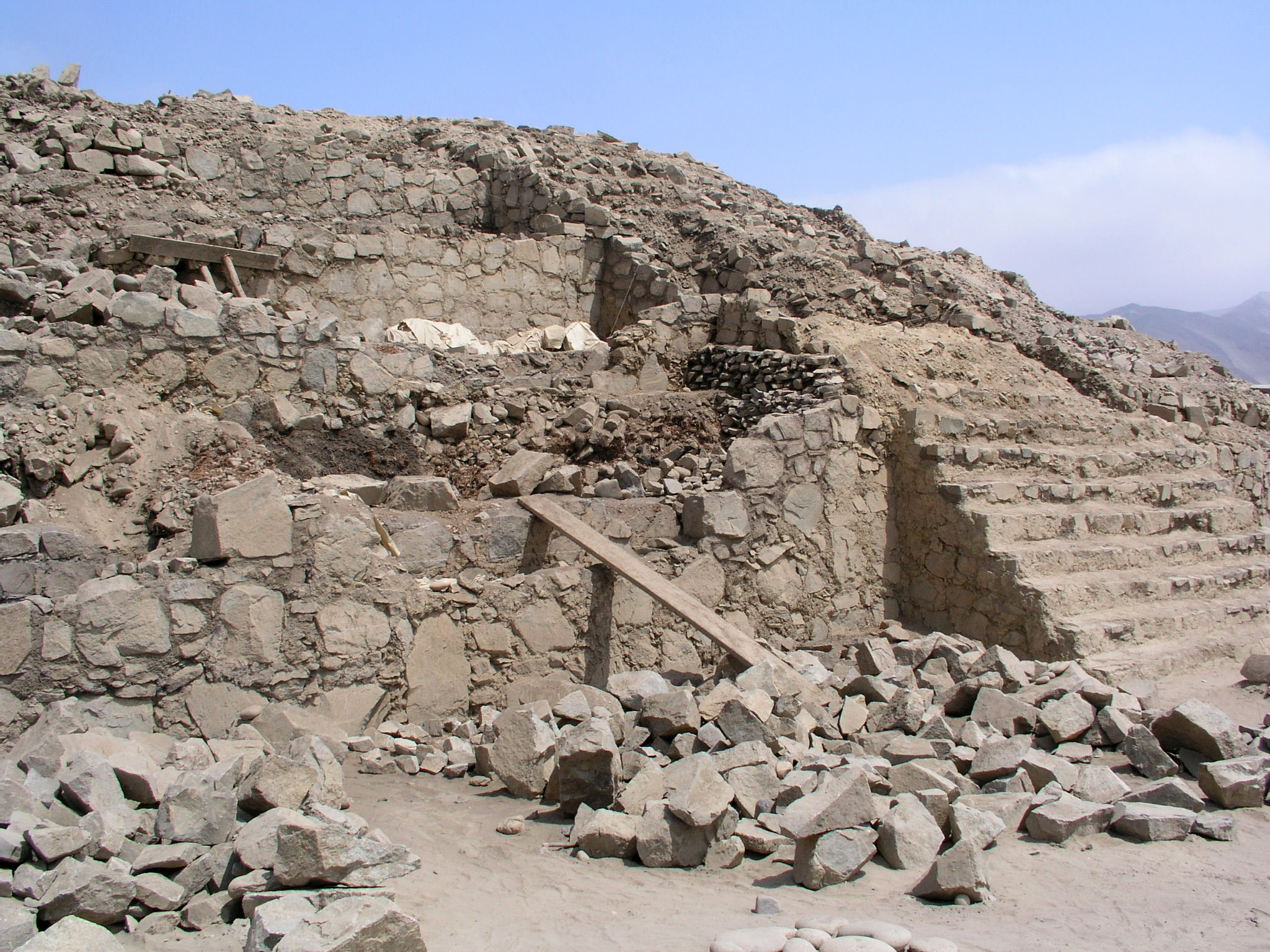 Pirámides en Caral, Valle de Supe, Region Lima, Peru.